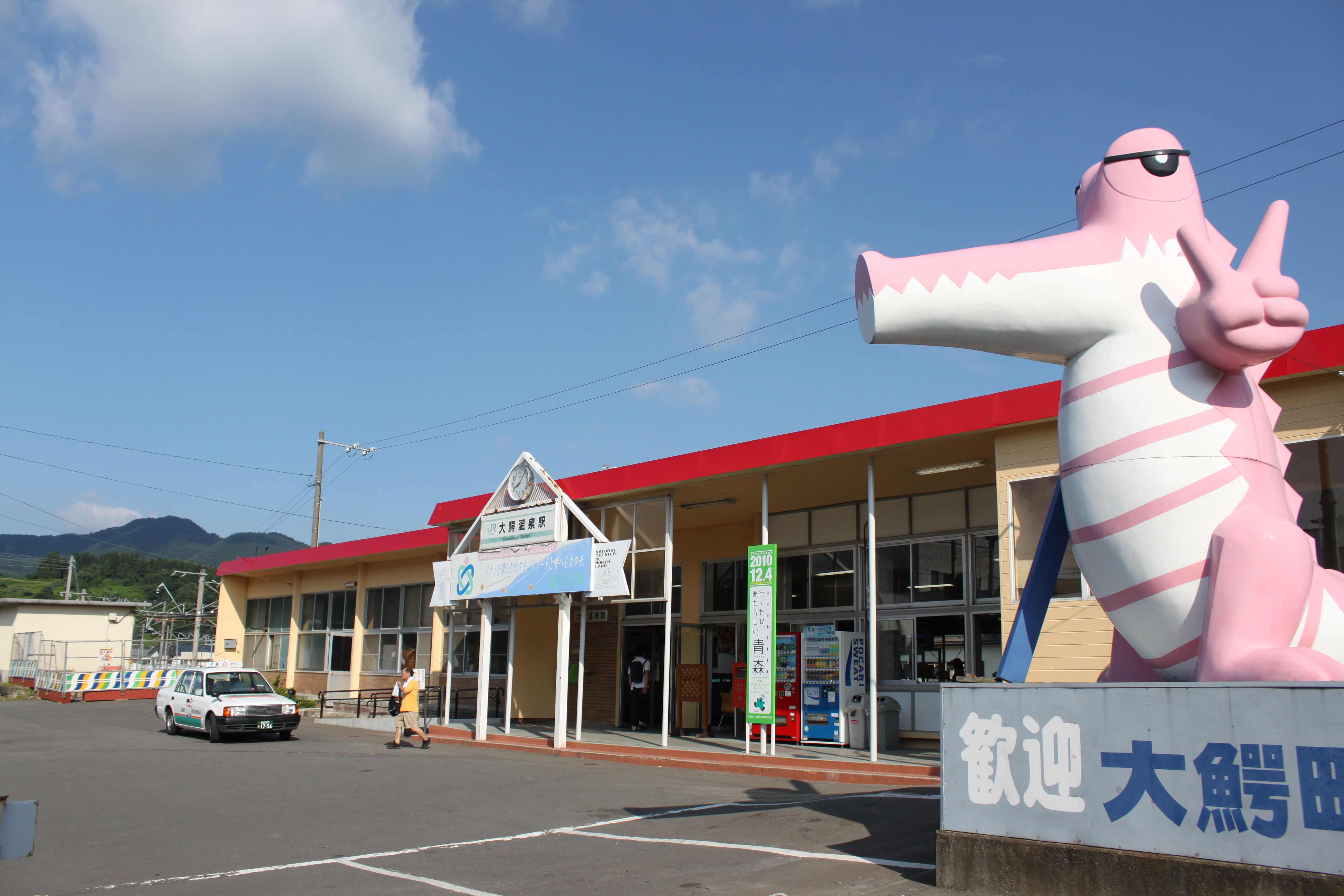 大鰐温泉駅